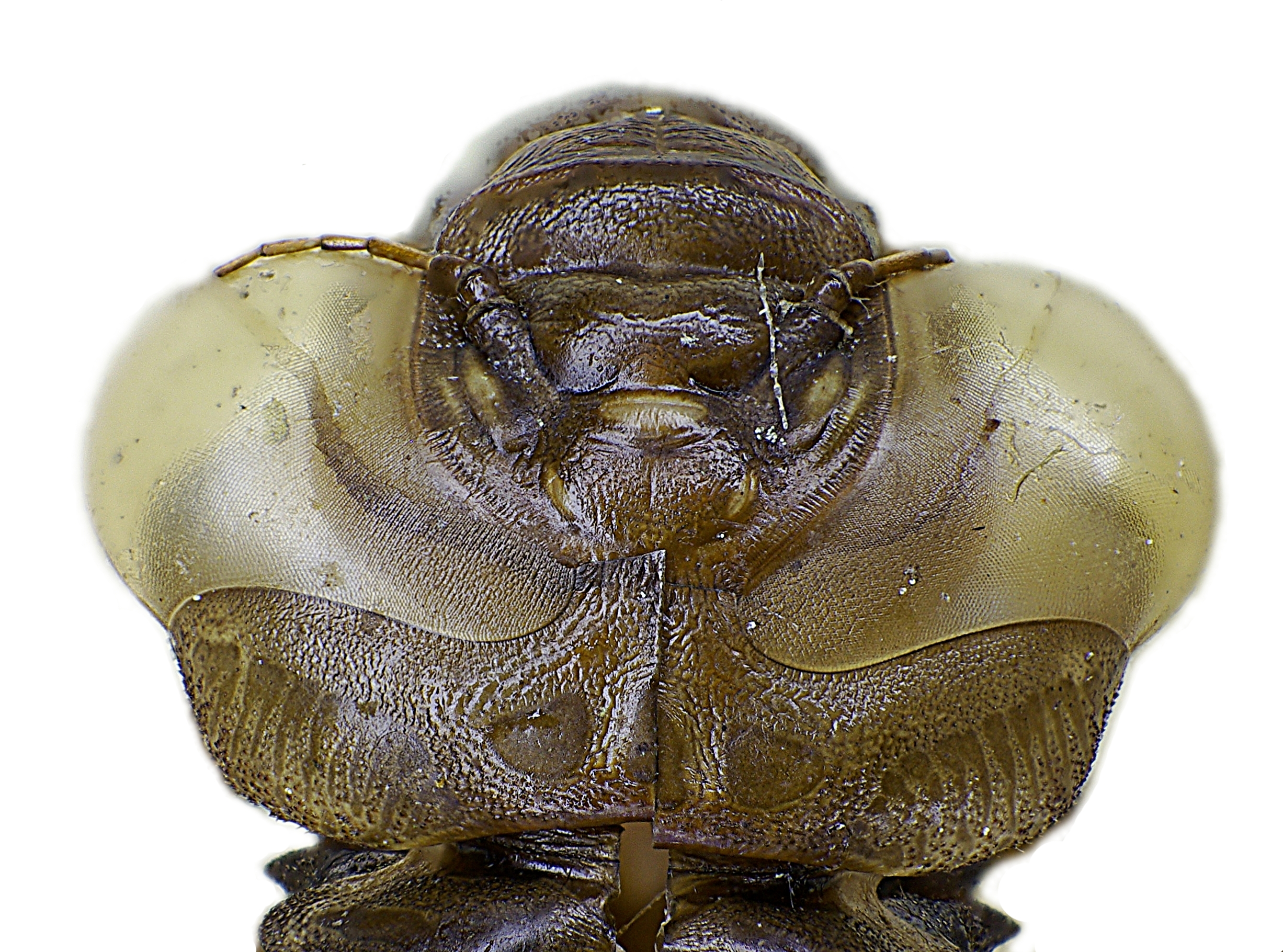 Kopf der Exuvie von Aeshna juncea